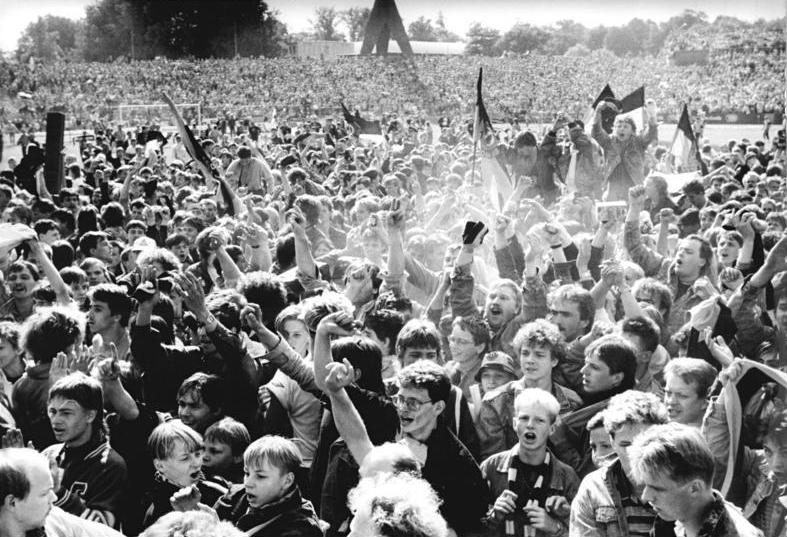 ADN-Häßler-26.5.90-Dresden-Dresden ist DDR-Fußballmeister Tausende begeisterter Fußballfans stürmten den Stadioninnenraum, als das Ergebnis feststand: der Titel des DDR-Fußballmeisters bleibt auch 1990 in Dresden